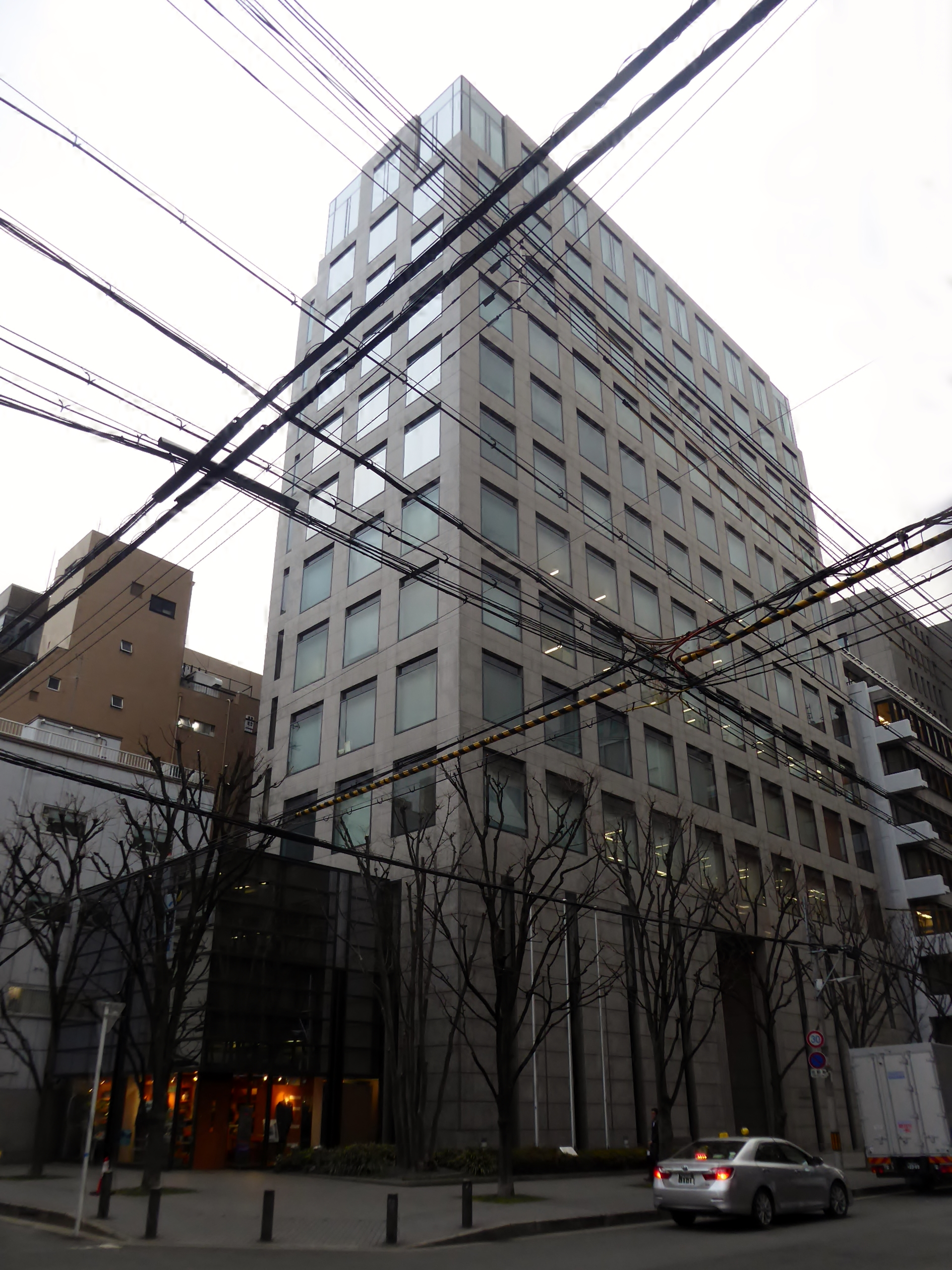 日本毛織株式会社本社を撮影。